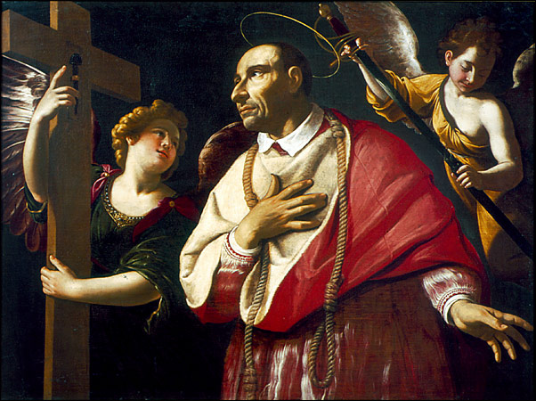 San Carlos Borromeo con dos ángeles